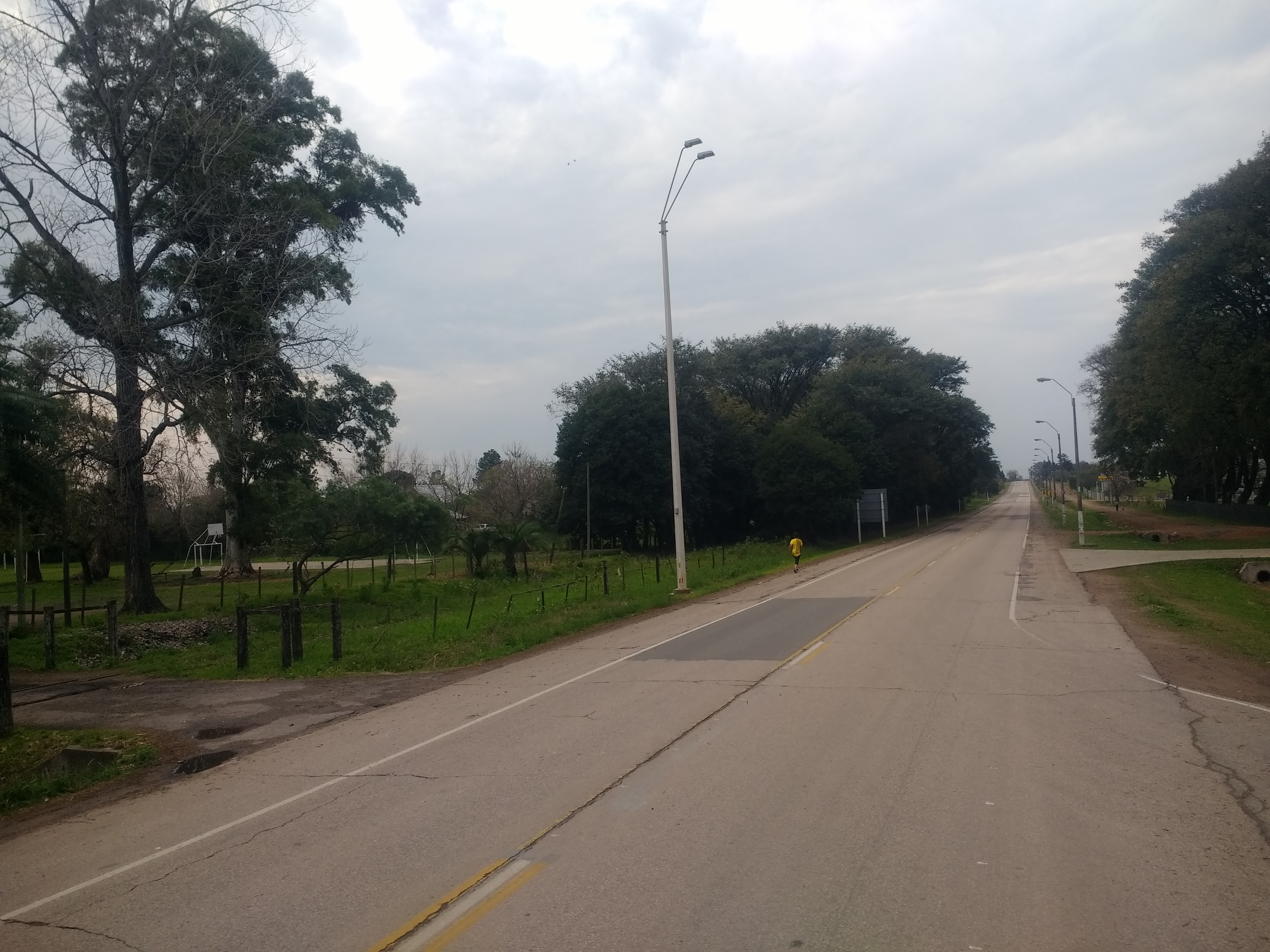 Ruta 90 cerca de la ciudad de Paysandú.